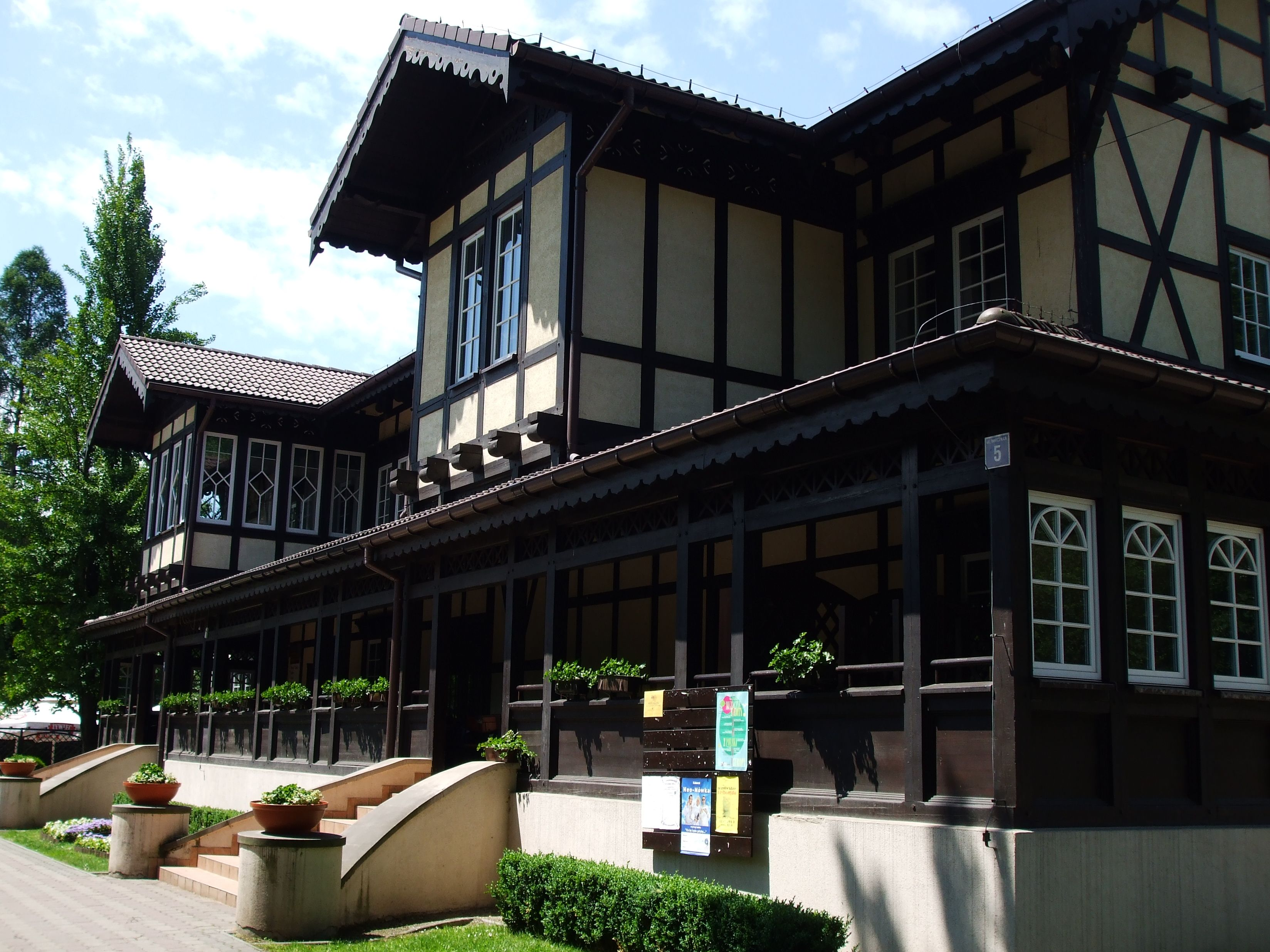 Dom Zdrojowy w Jastrzębiu-Zdroju